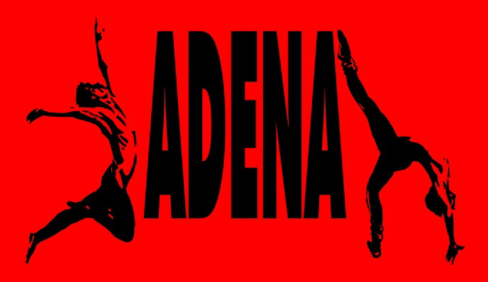 logo zespołu